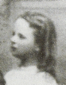 Dit is een foto uit +/- 1865; een simpele rekensom laat zien dat het zeer hoogstonwaarschijnlijk is dat op deze foto auteursrechten berusten.